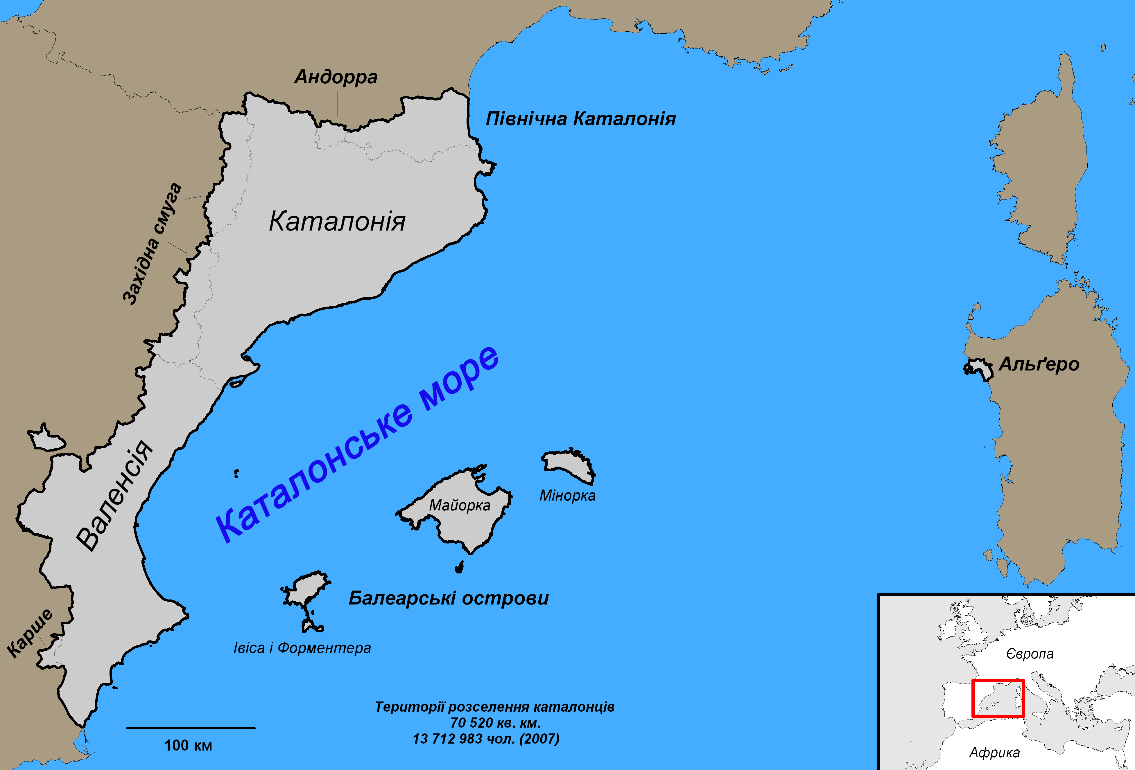 Розселення каталонців у Європі. Карта з територіями розселення каталонців у Південно-західній Європі